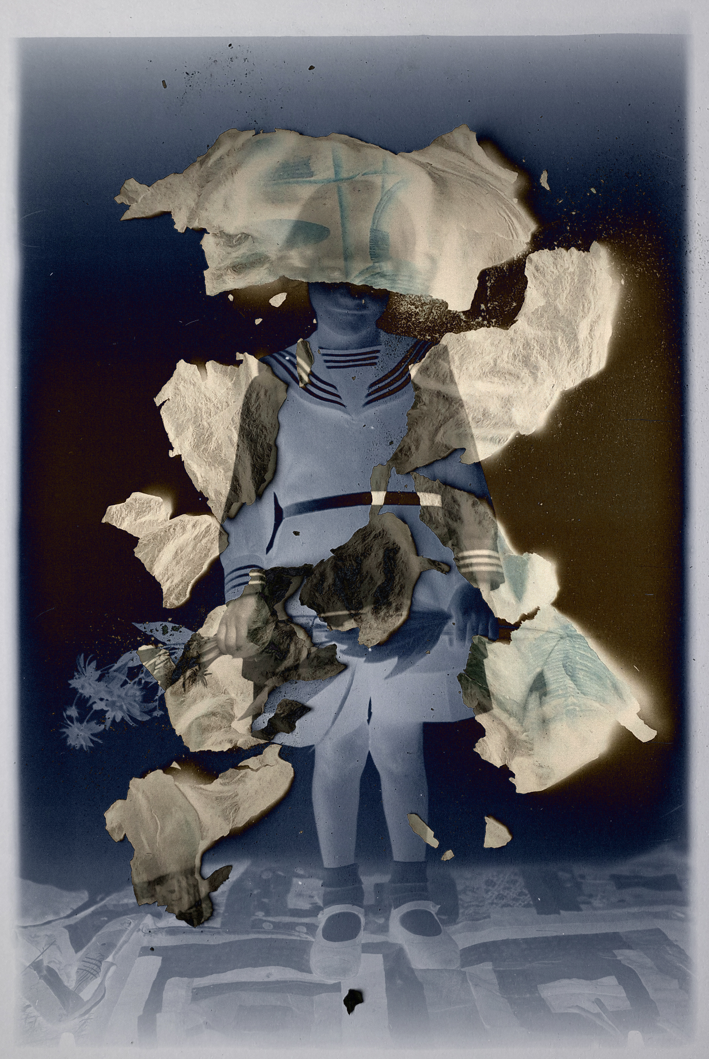 Kolaż (fotografia, popiół, technika mieszana, obróbka cyfrowa) na podstawie zdjęcia autorstwa Narcyza Witczaka-Witaczyńskiego - "Manewry 1 Pułku Strzelców Konnych - pobyt w Gąsiorowie (107-685-2)", instytucja: Narodowe Archiwum Cyfrowe. Wychodząc od połączenia fotografii z tkankami wypalonego papieru (na zasadzie kolażu tradycyjnego i cyfrowego lub bezpośredniej ingerencji w reprodukcję lub cyfrowy oryginał), a także analizując zbiory, udostępnione przez instytucje kultury mogę łączyć wyselekcjonowany przeze mnie materiał w grupy tematyczne, budować między nimi dialog, umieszczając je w różnym kontekście, budować mapy powiązań, tworzyć kontrasty i nowe znaczenia.